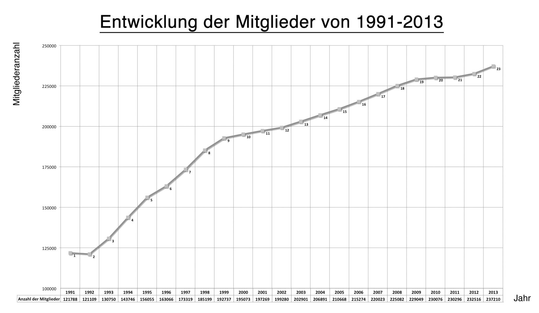 Mitgliederentwicklung LSB M-V von 1991 - 2013 Quelle: Statistik 2013 des Landessportbundes Mecklenburg-Vorpommern e.V.